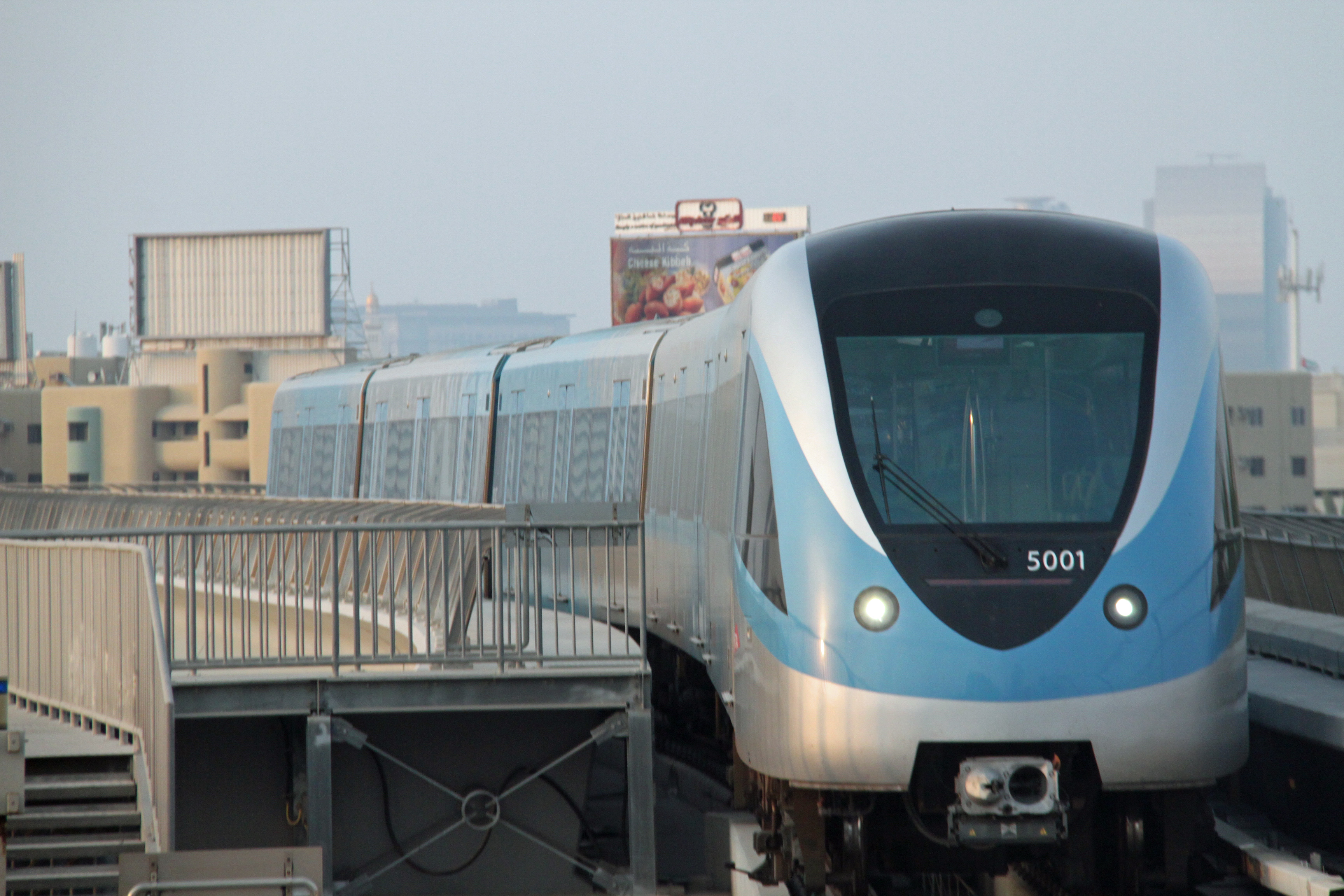 Een treinstel van de metro van Dubai